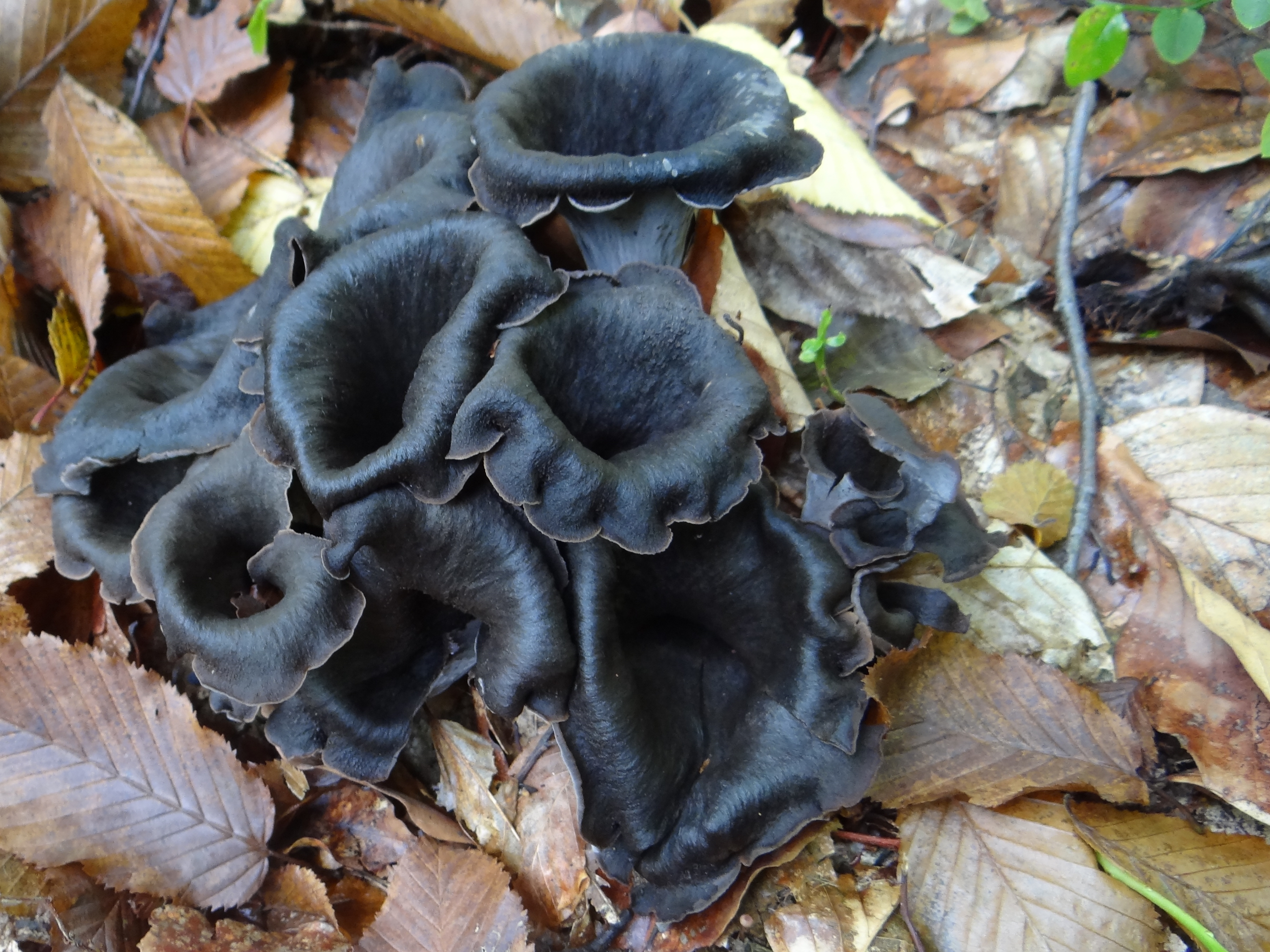 Craterellus cornucopioides (location: Poland, Rdzawa (województwo małopolskie)